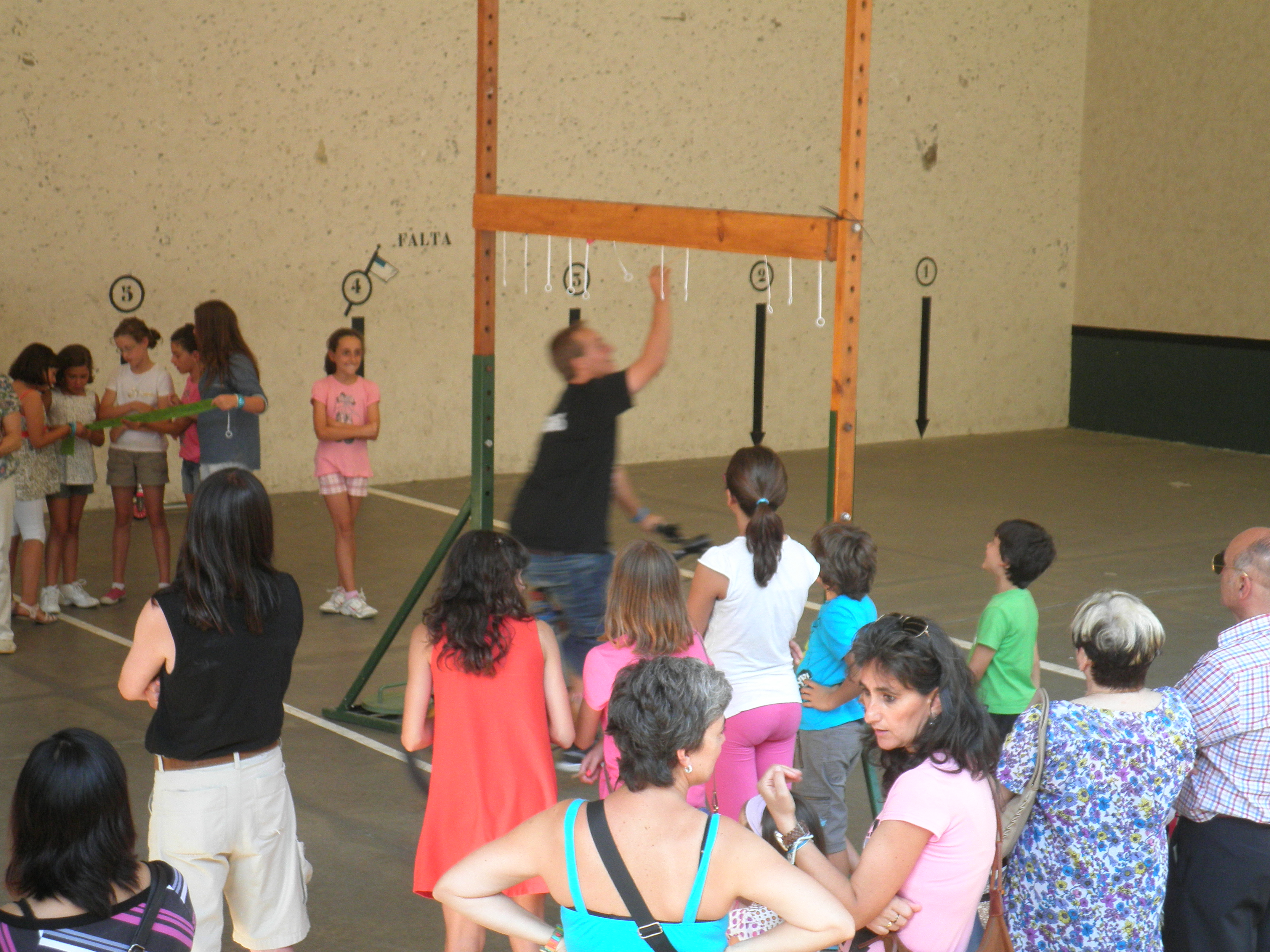 Zinta jokoa Amara zaharrean Santiago egunean, Mundo Nuevok antolatua.